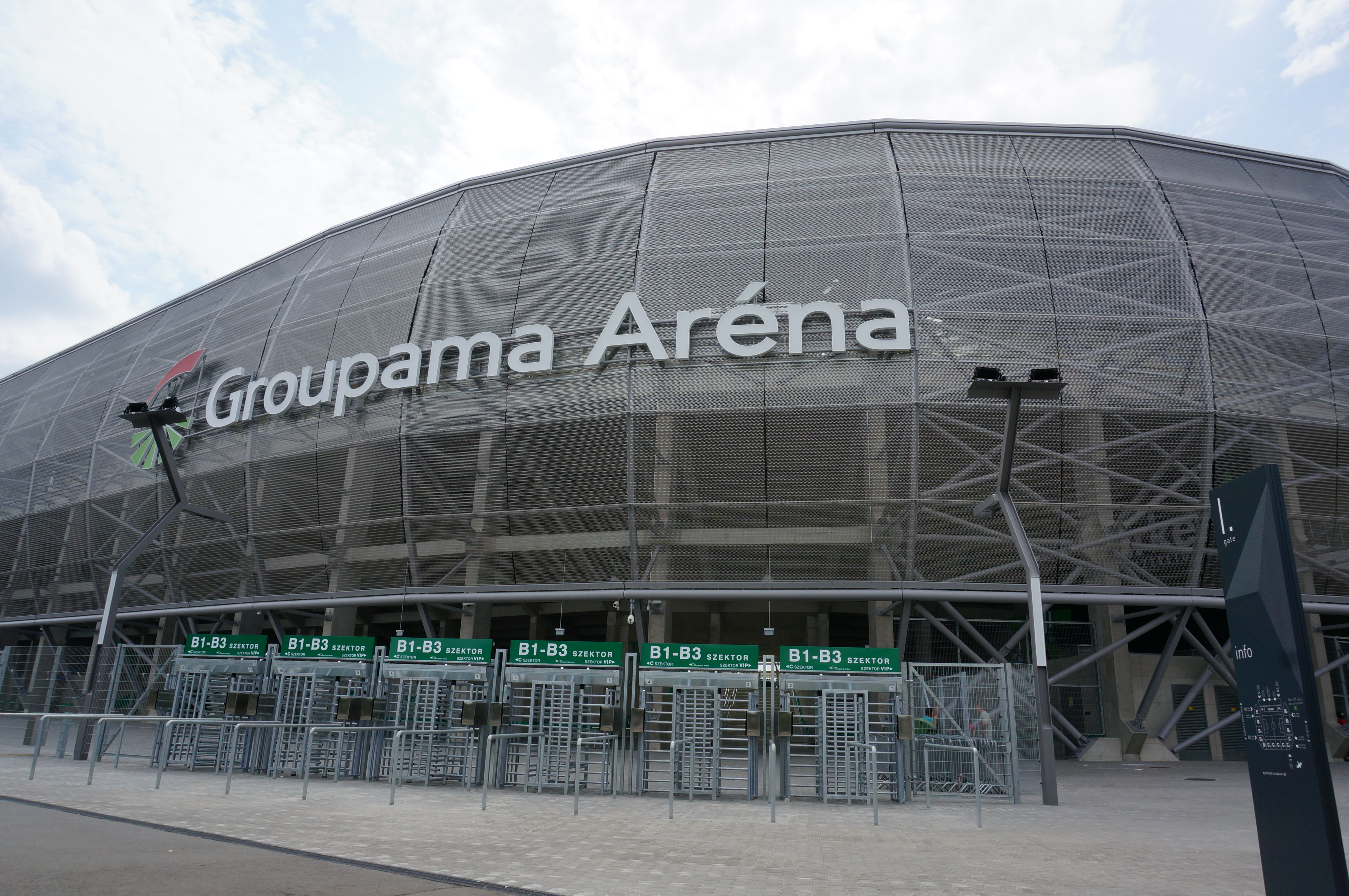 Stade à Budapest.